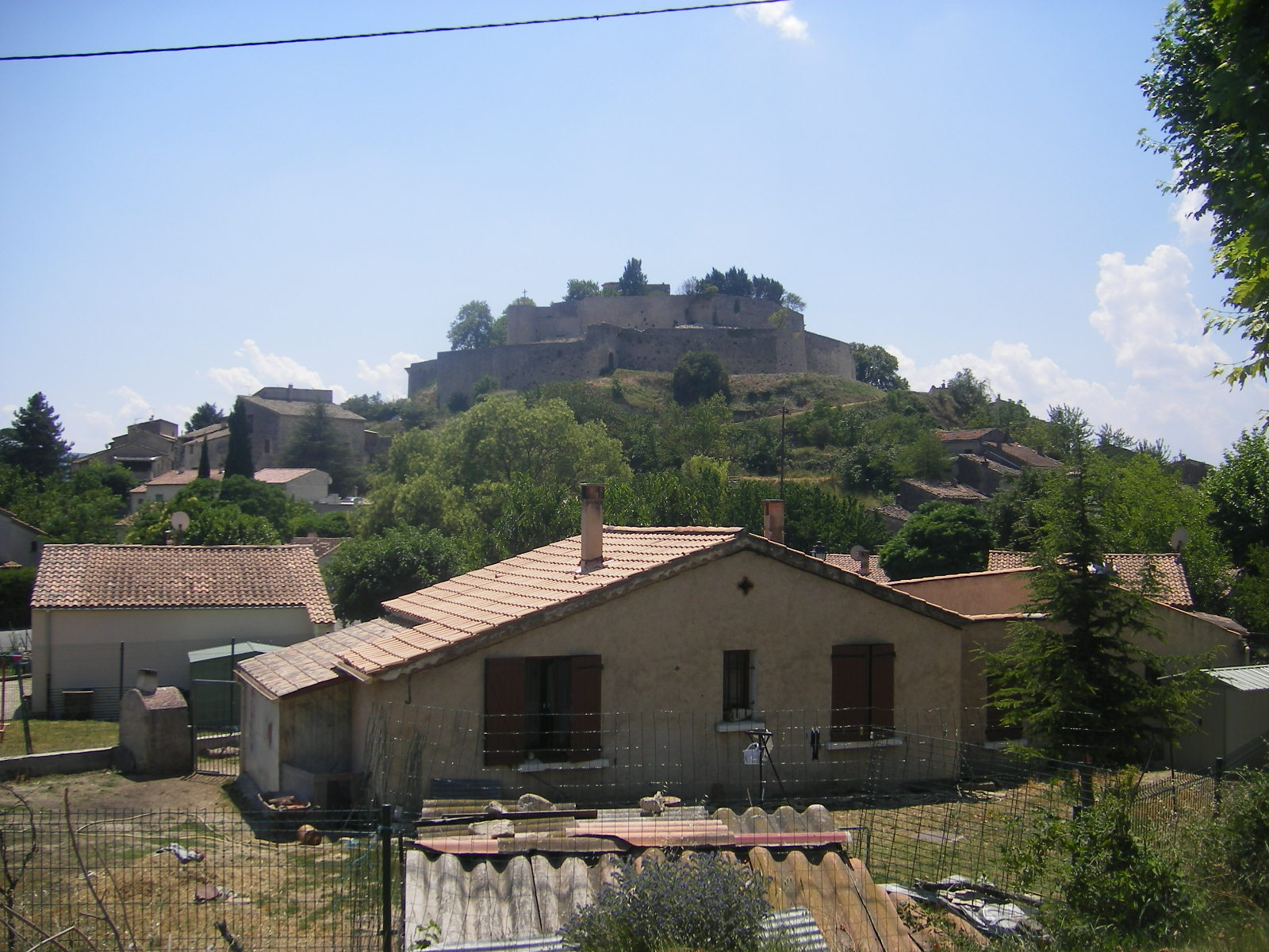 Mane